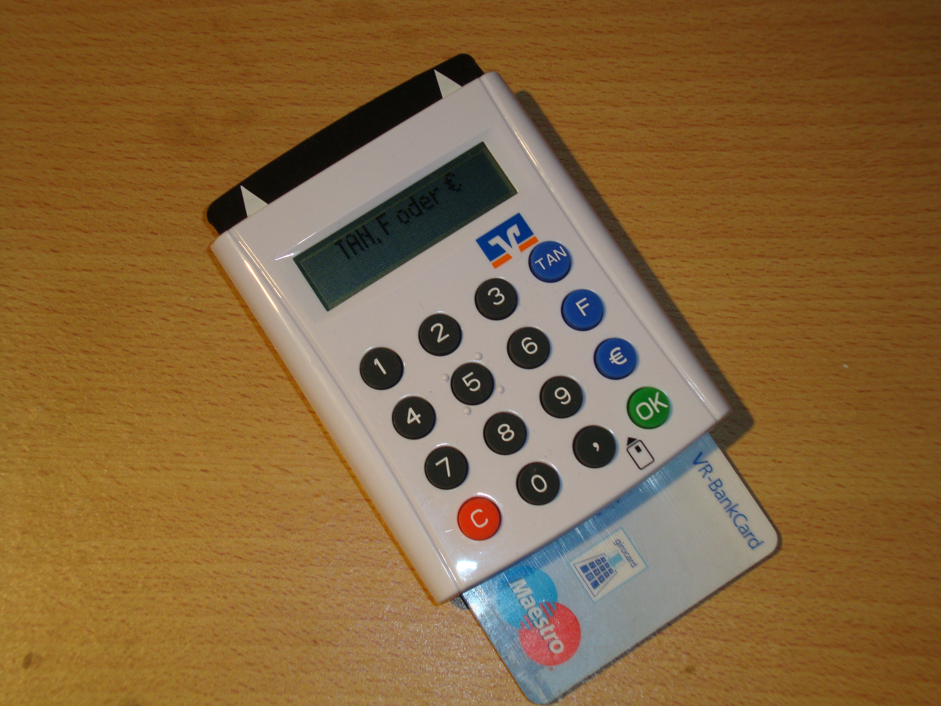 sm@rtTAN-Gerät zum Online-Banking mit eingeschobener Bankkarte